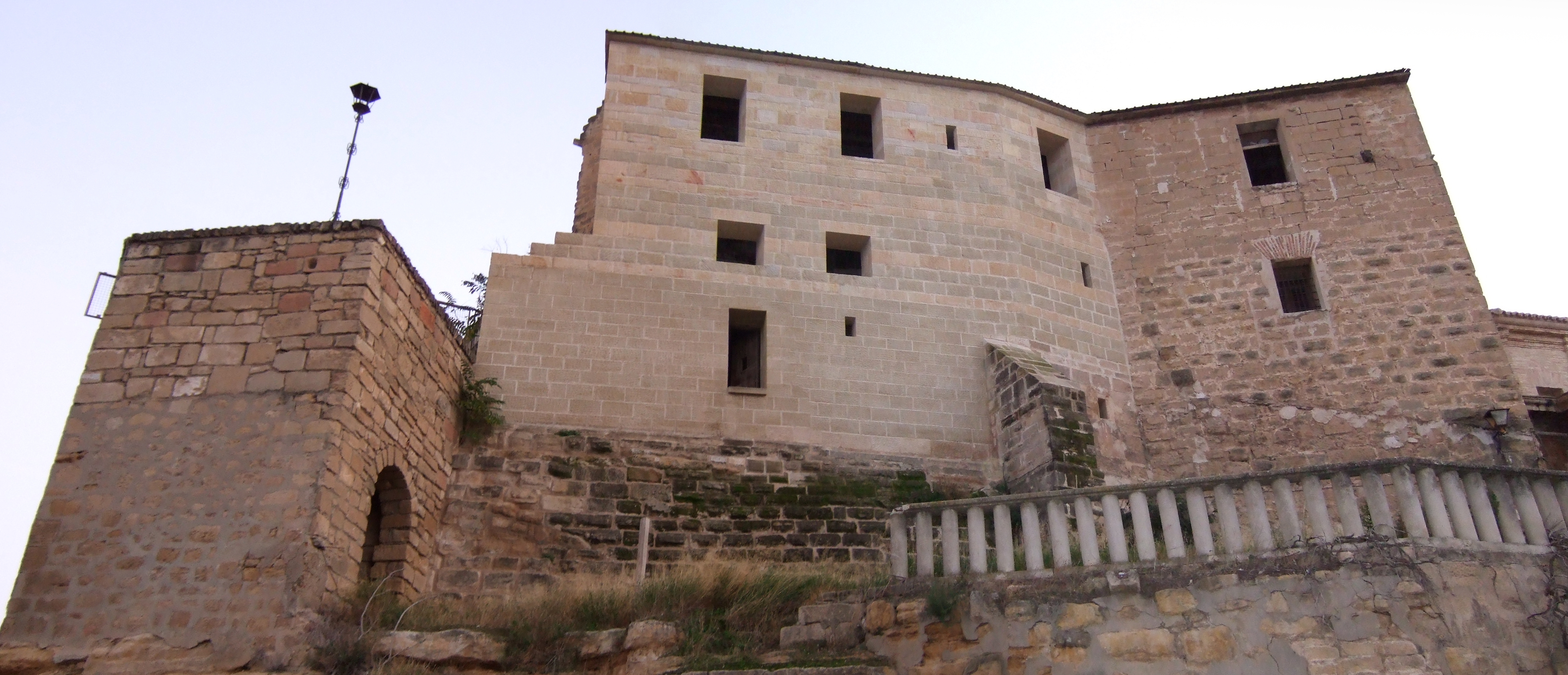 Castell del Compromís, priorat de Sant Jaume, a Casp.